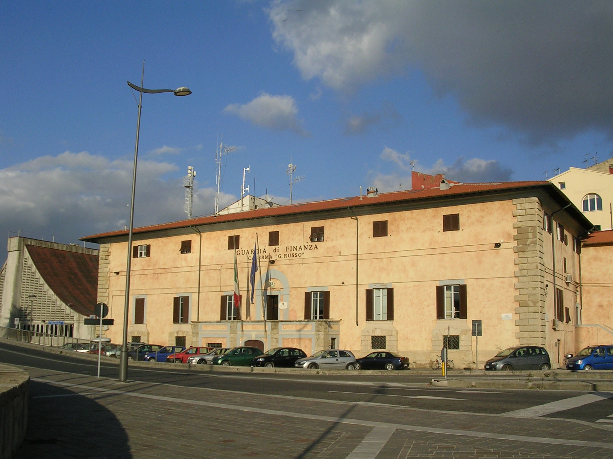 Livorno: il Palazzo Mediceo, tra i più antichi palazzi della città.